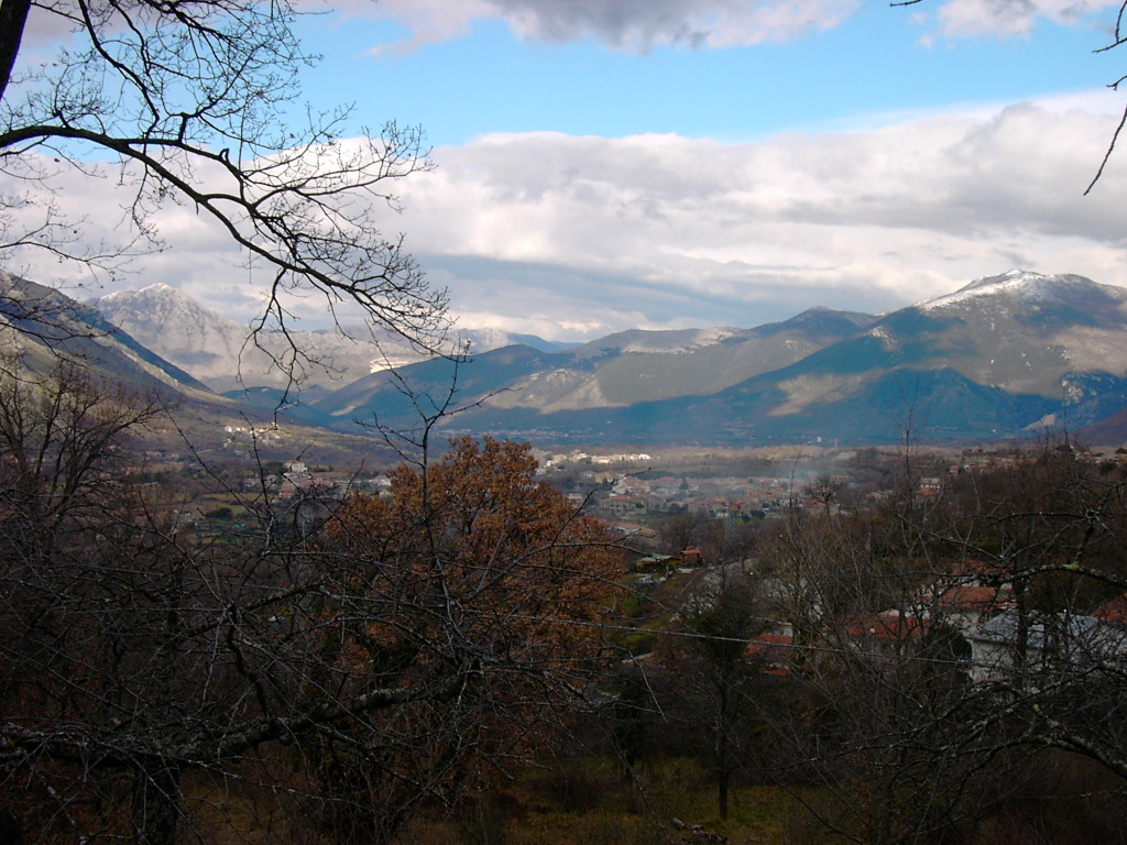 Galluccio, Campania, Italy